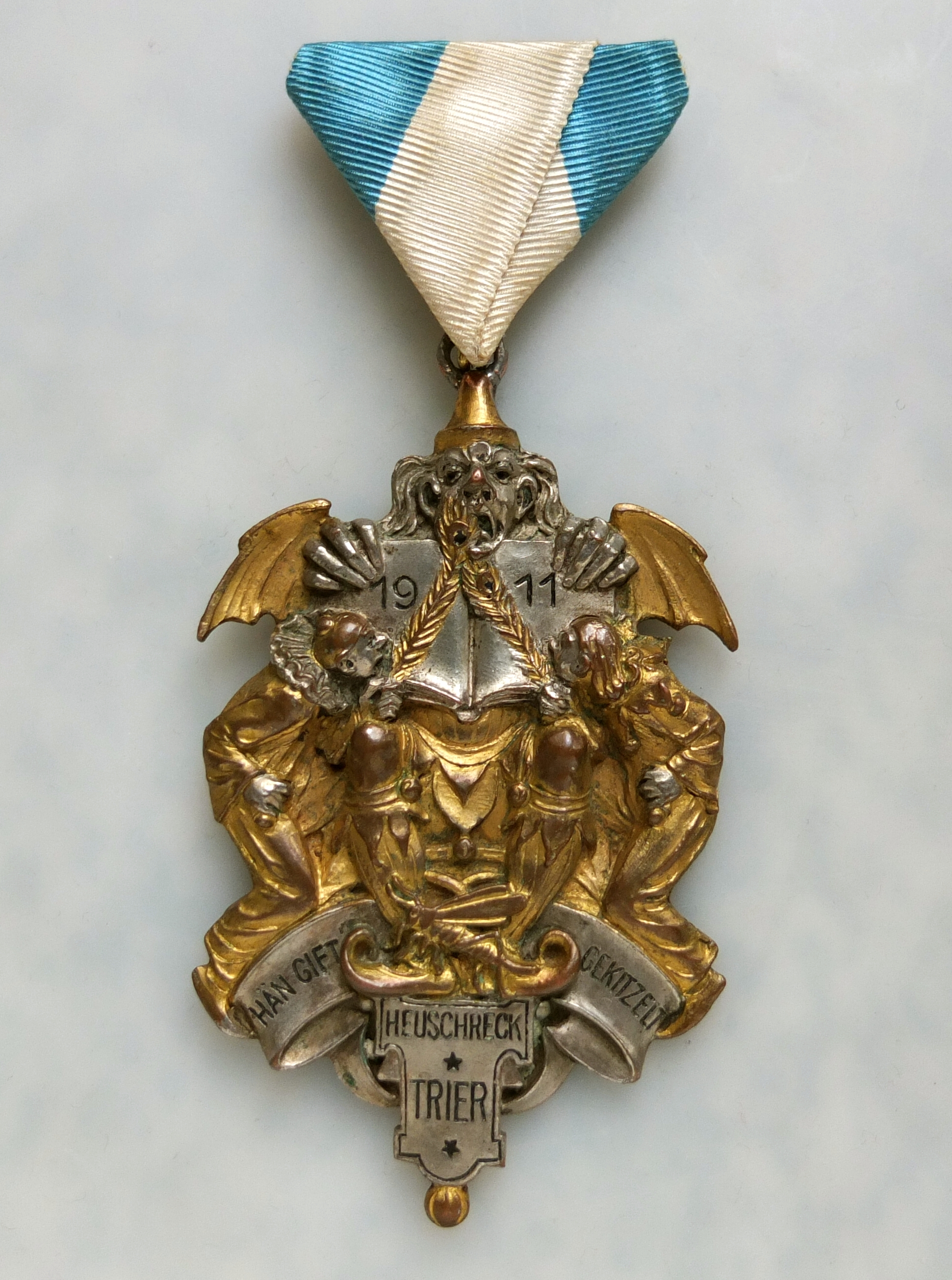 Karnevalsorden der Trierer Karnevalsgesellschaft Heuschreck von 1911: Zwei Narren kitzeln den Reichsadler mit Pfauenfedern, darunter eine Heuschrecke. Text: "Hän gift [er wird] gekitzelt - Heuschreck Trier"